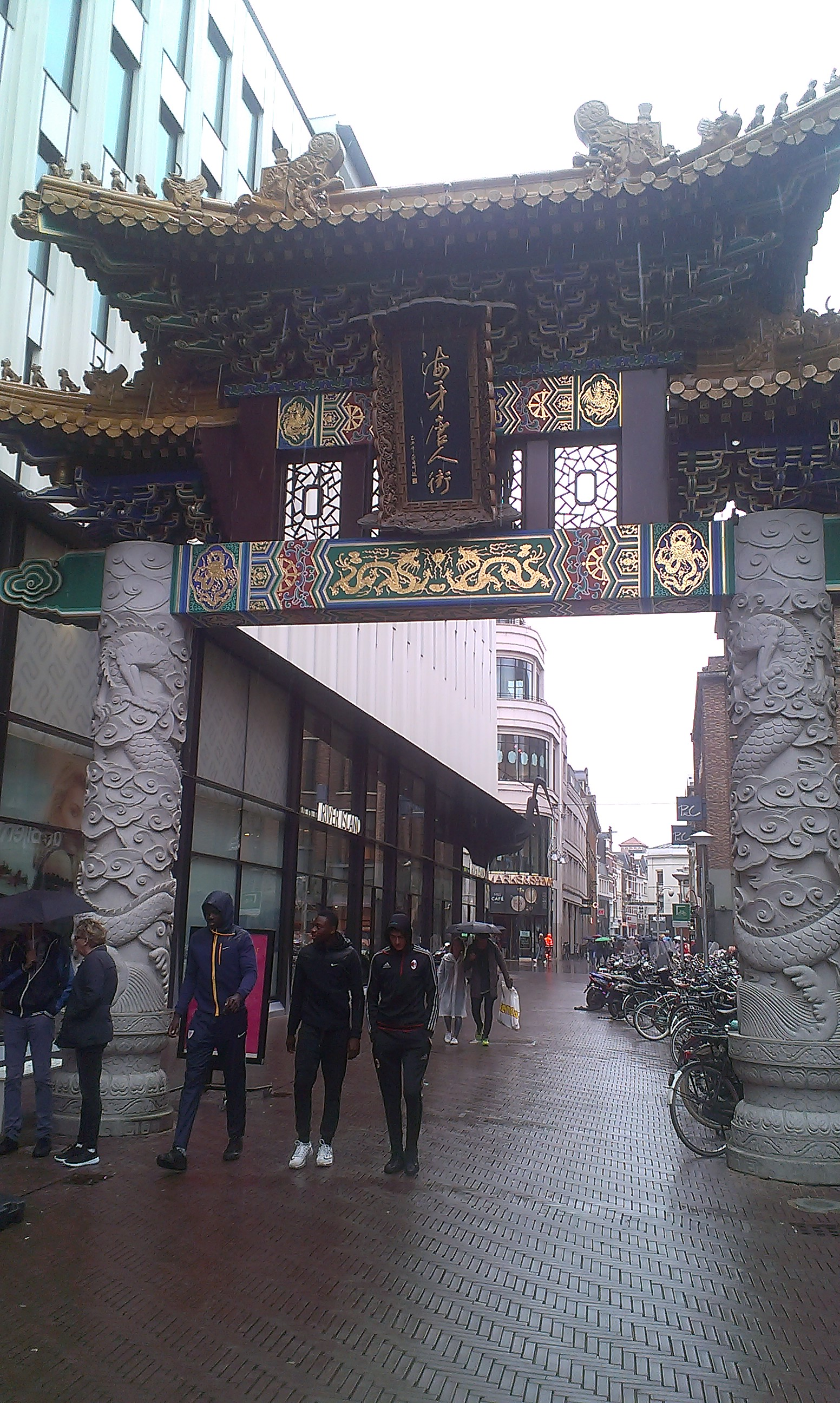 Den Haag, Chinatown